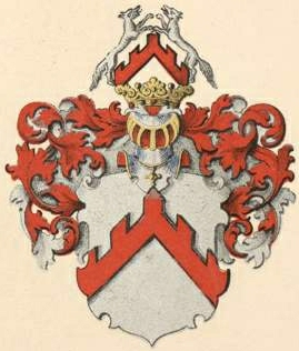 Buxhoevedeni suguvõsa aadli- ja parunivapp